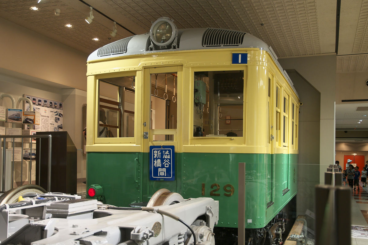 地下鉄博物館に展示されている銀座線100形の一部。旧東京高速鉄道登場時の姿に復元。